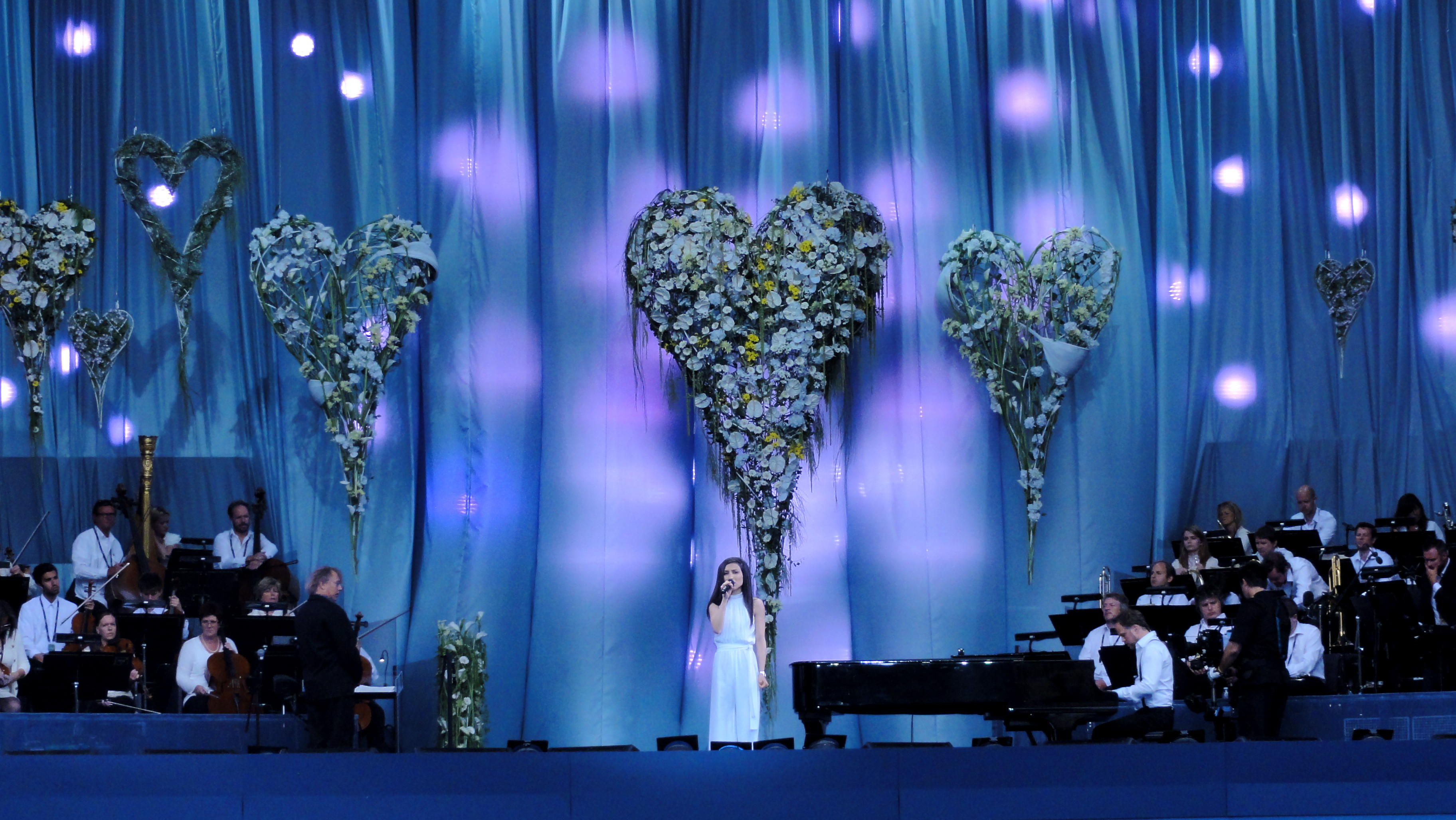 Laleh og Norsk Radios orkester, tilsammen ved Nasjonal Minneskonsert 2012 i Vika i Oslo.